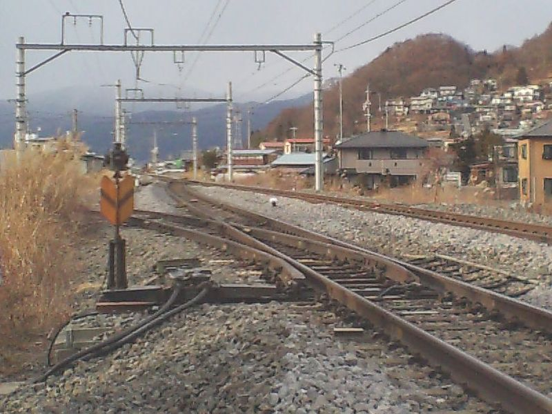 普門寺信号場